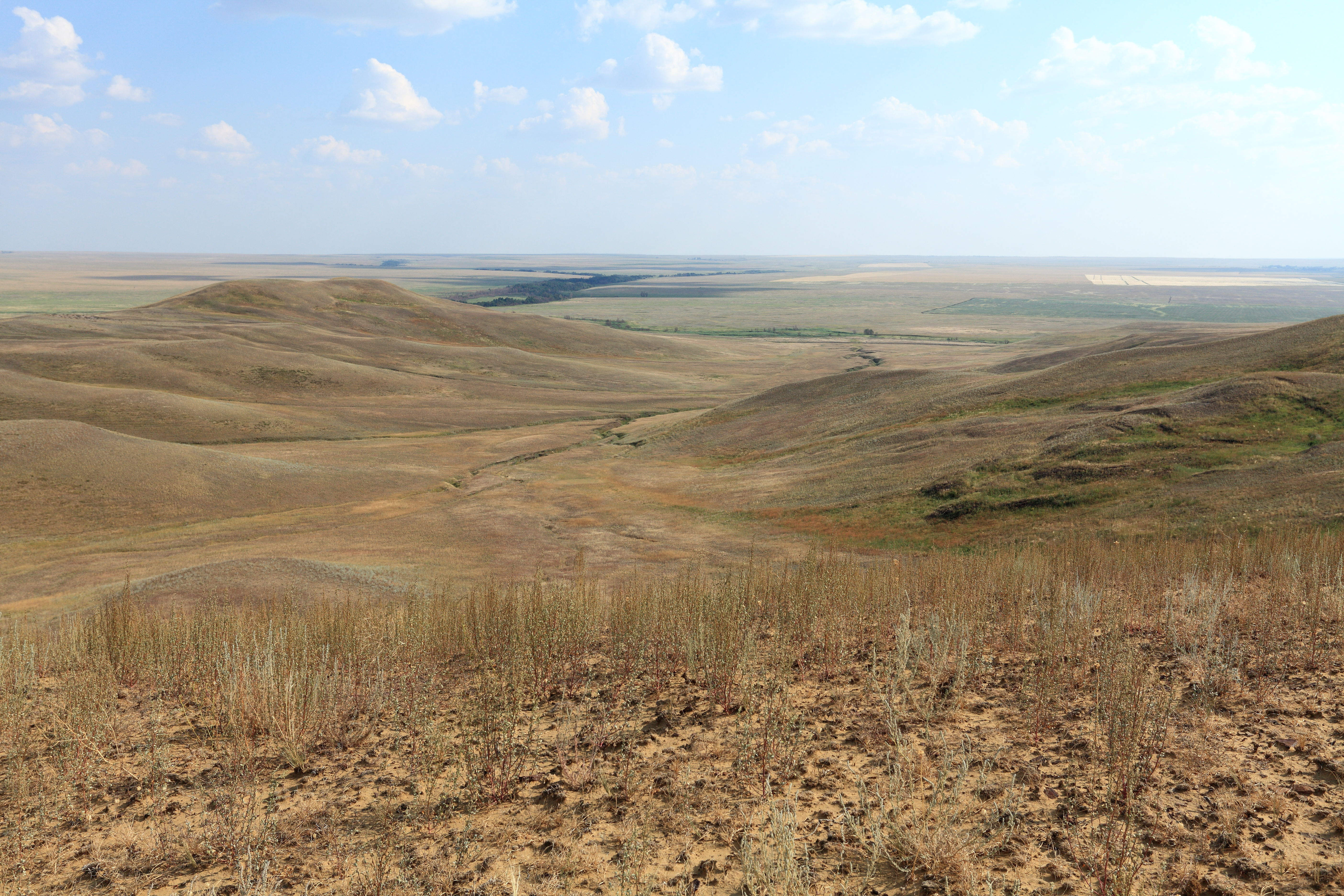 Вид с возвышенности в южном направлении